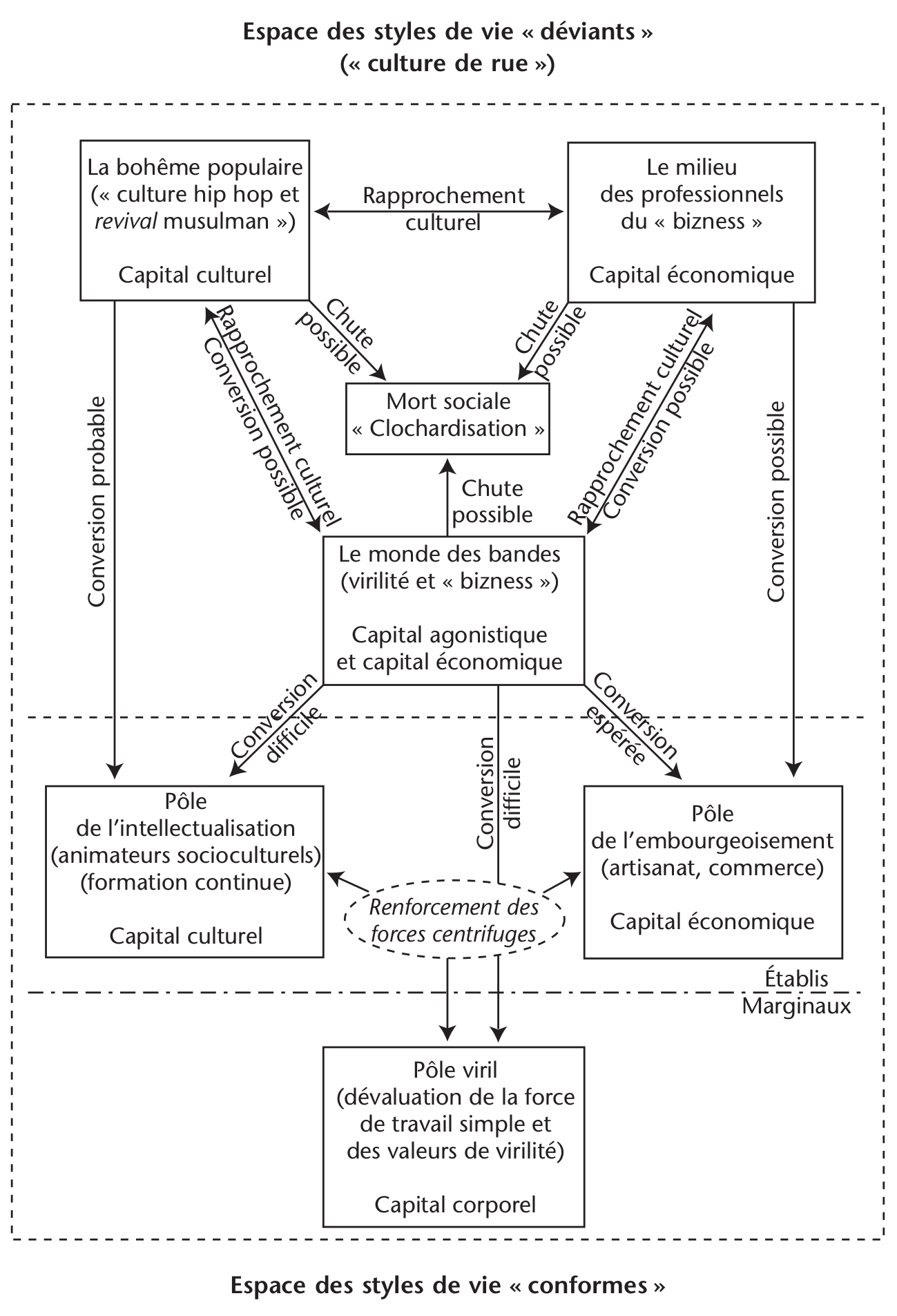 Tableau synoptique_Gérard Mauger